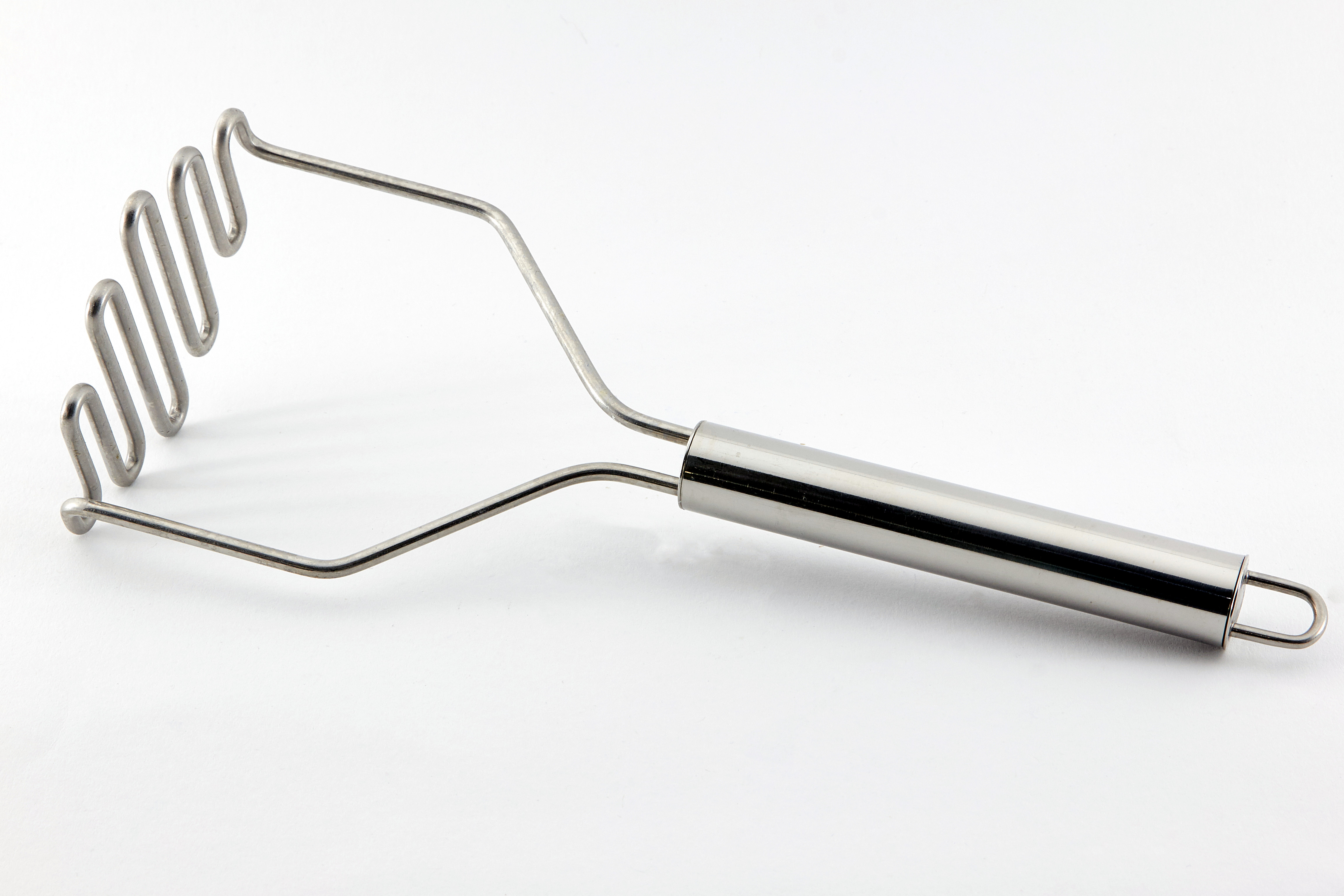 Kartoffelstampfer